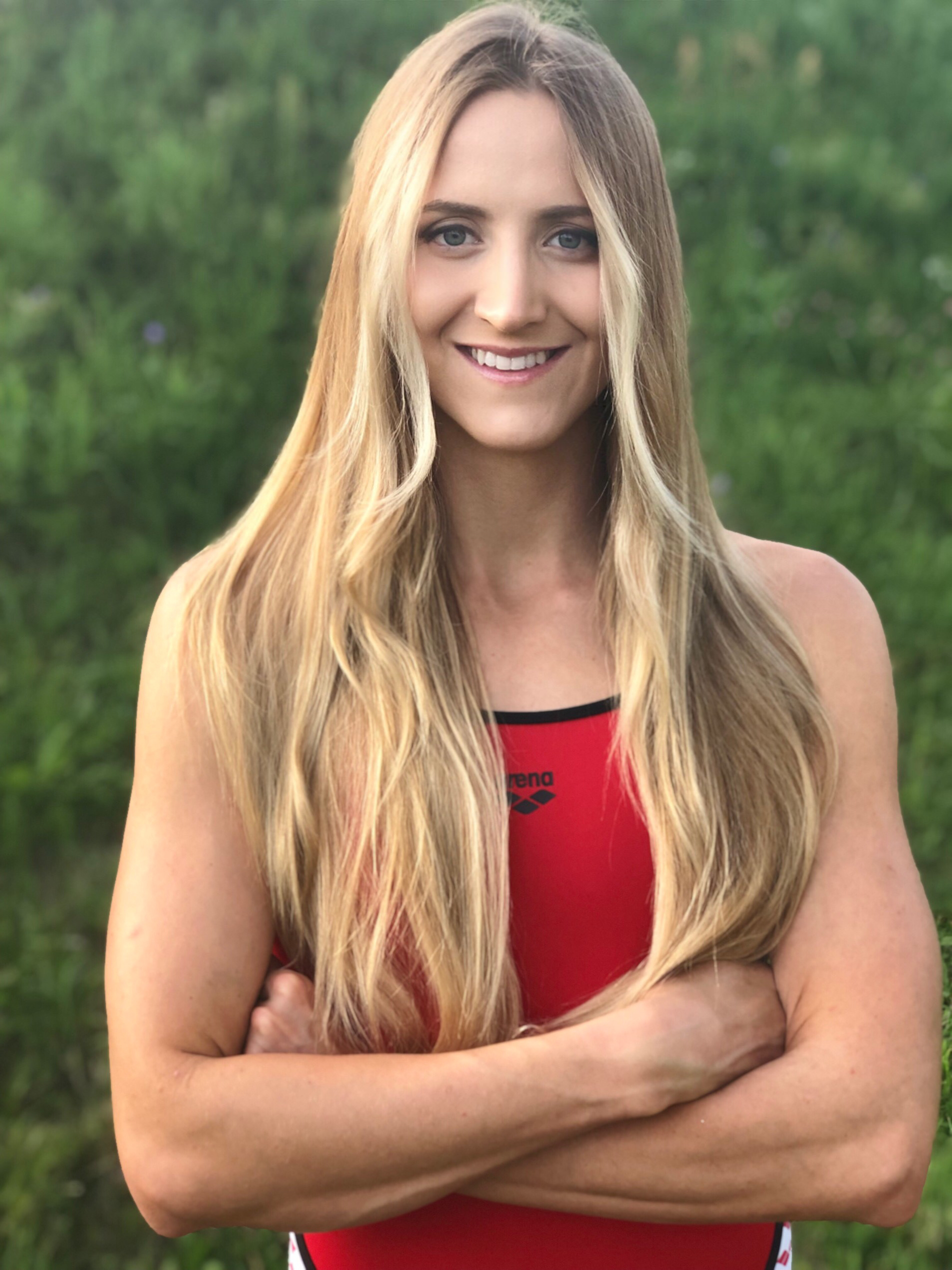 kasia wasick headshot